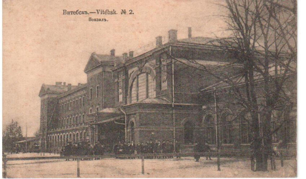 Вокзал ж. д. станции Витебск. Вид с привокзальной площади. Около 1904-1917 гг.